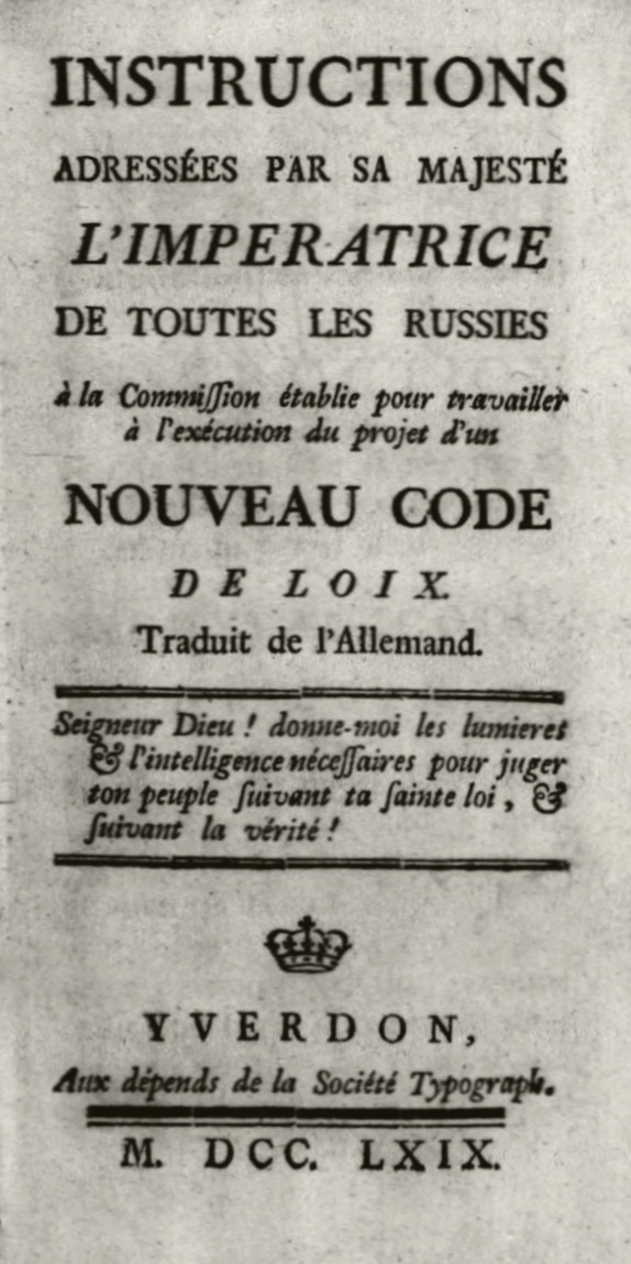 Frontespizio